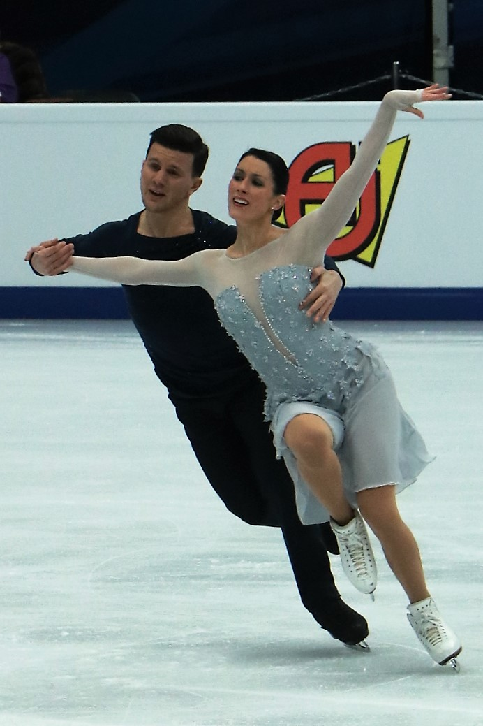 Шарлен Гиньяр / Марко Фаббри (Италия) на Чемпионате Европы по фигурному катанию 2018.